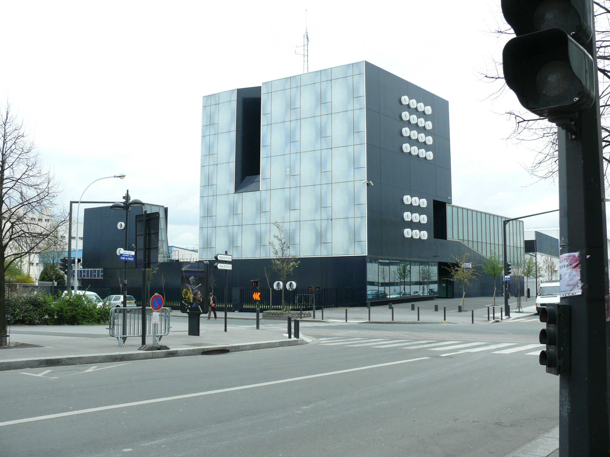 Commissariat de la Plaine Saint-Denis